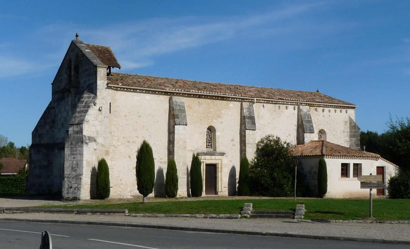 Eglise de Saint-Yzan-de-Soudiac, Gironde, France